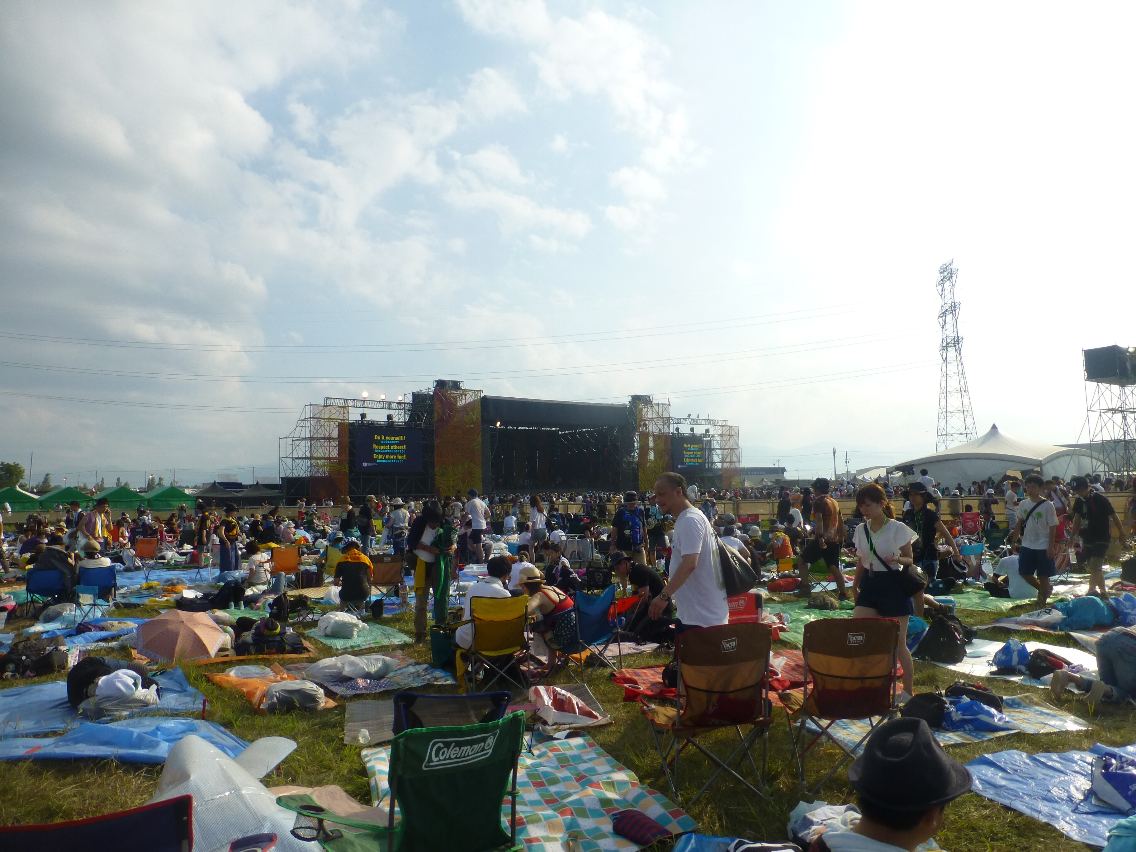 ライジング・サン・ロックフェスティバル (Rising Sun Rock Festival)